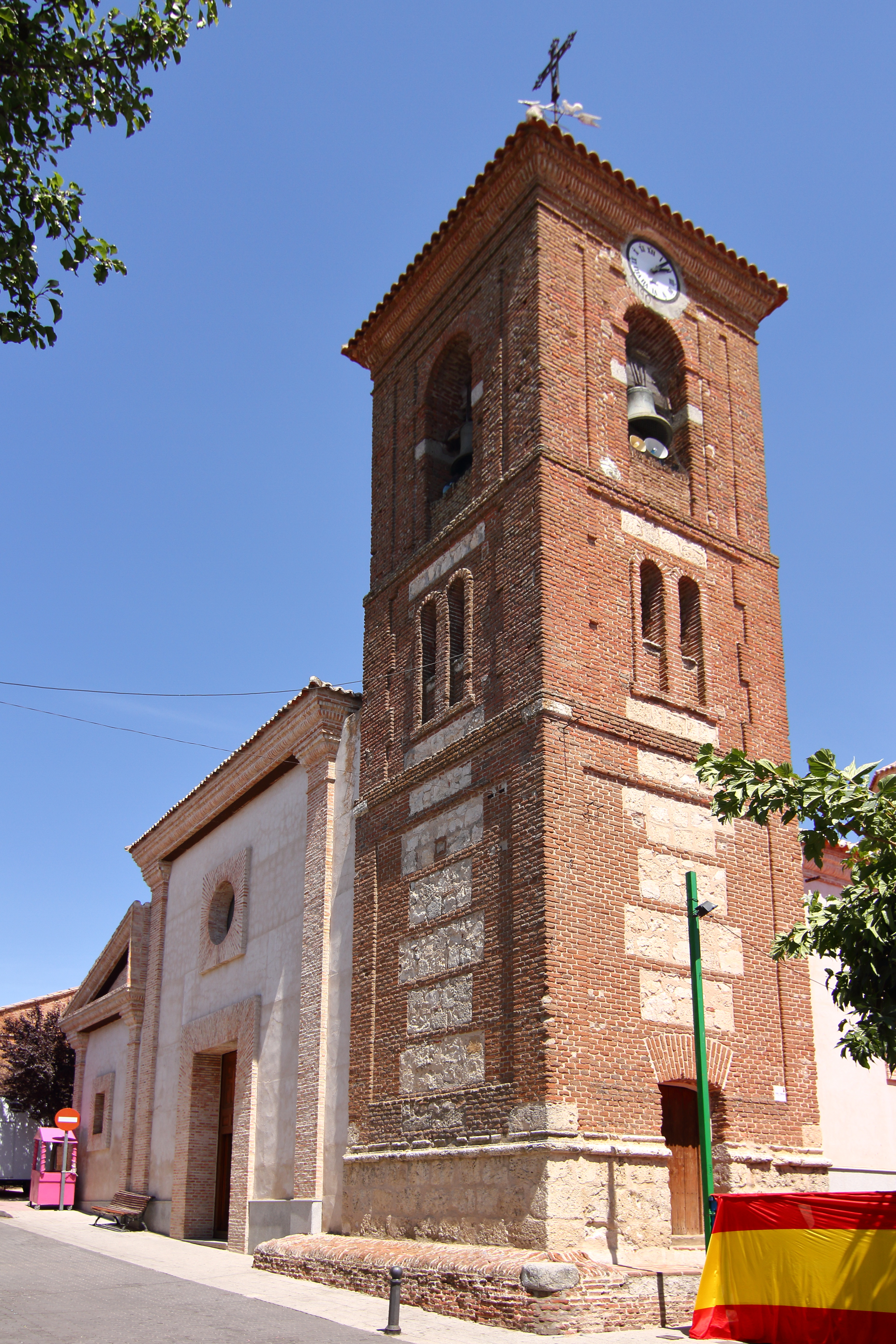 Quismondo, Iglesia parroquial, torre